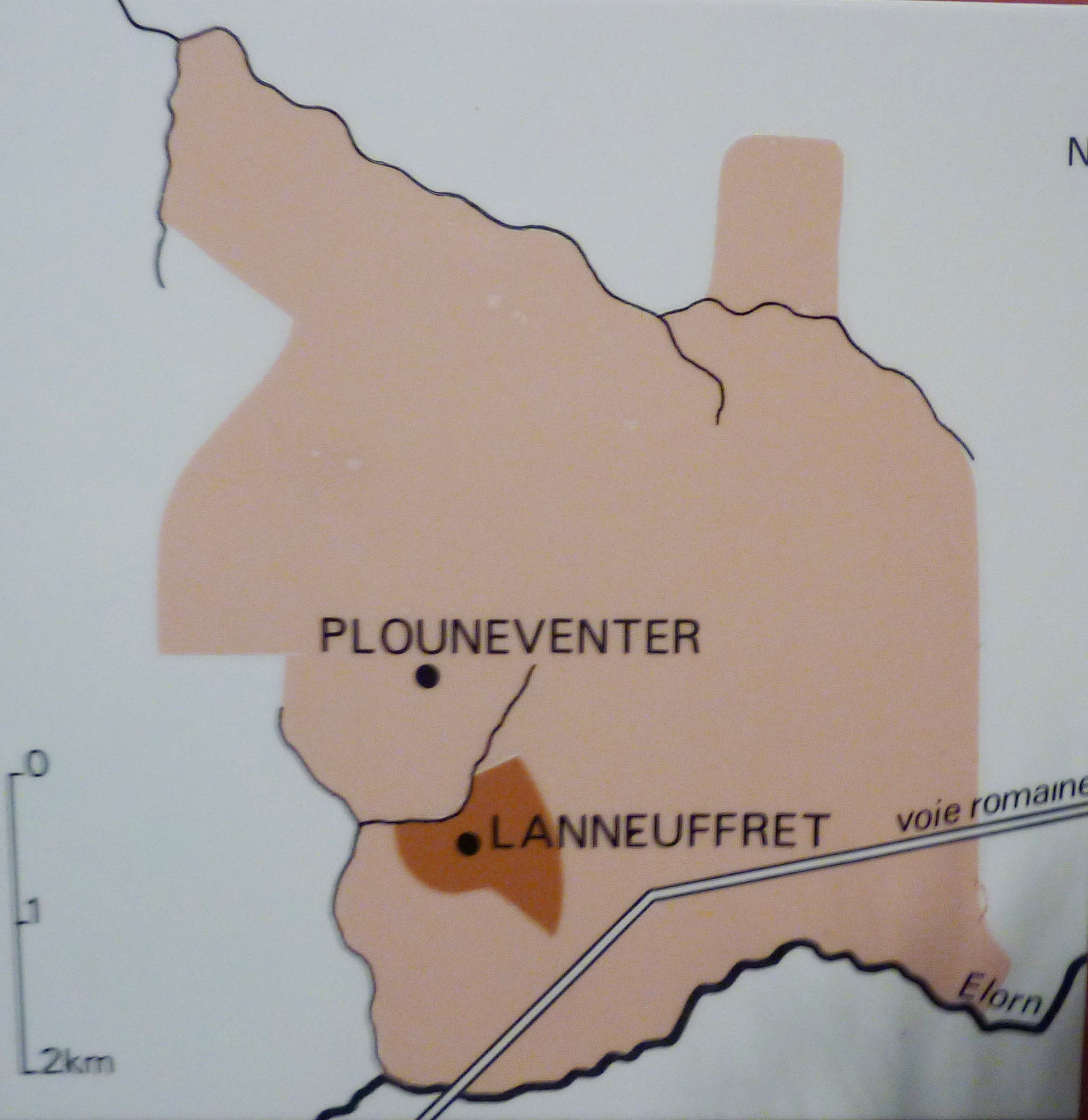 Carte des paroisses de Plounéventer et Lanneuffret (Musée de l'ancienne abbaye de Landévennec)